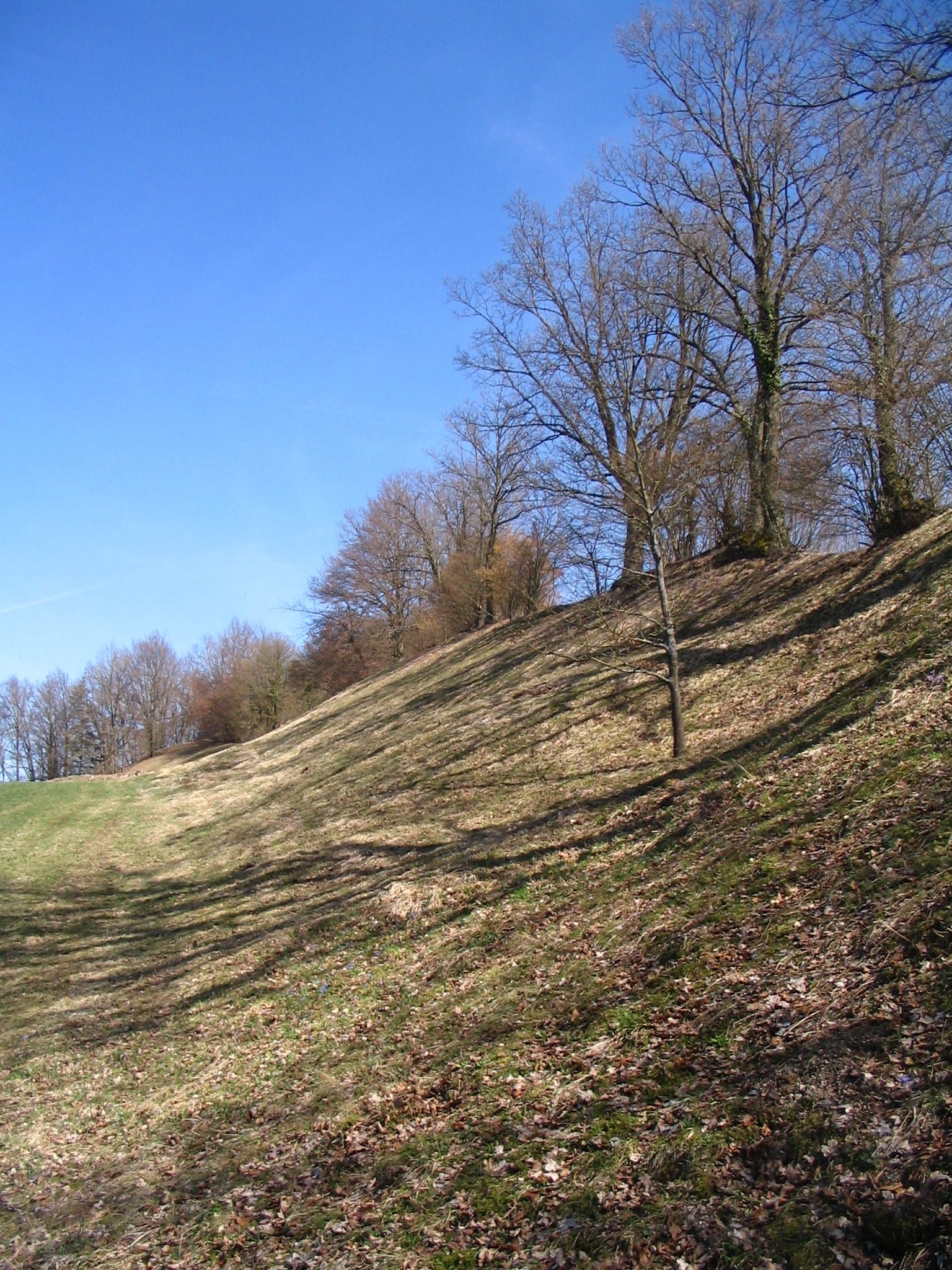 Der Wolfgangswall, Teil der einer frühgeschichtlichen Siedlungsanlage auf dem Arzberg (Frauenberg), befindet sich oberhalb des Kloster Weltenburg, Landkreis Kelheim, Niederbayern